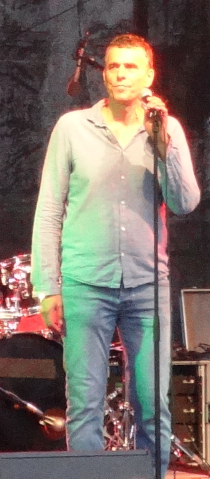 Ahmad Mesgarha auf der Bühne vor dem Schauspielhaus Dresden zur Saisoneröffnung 2014